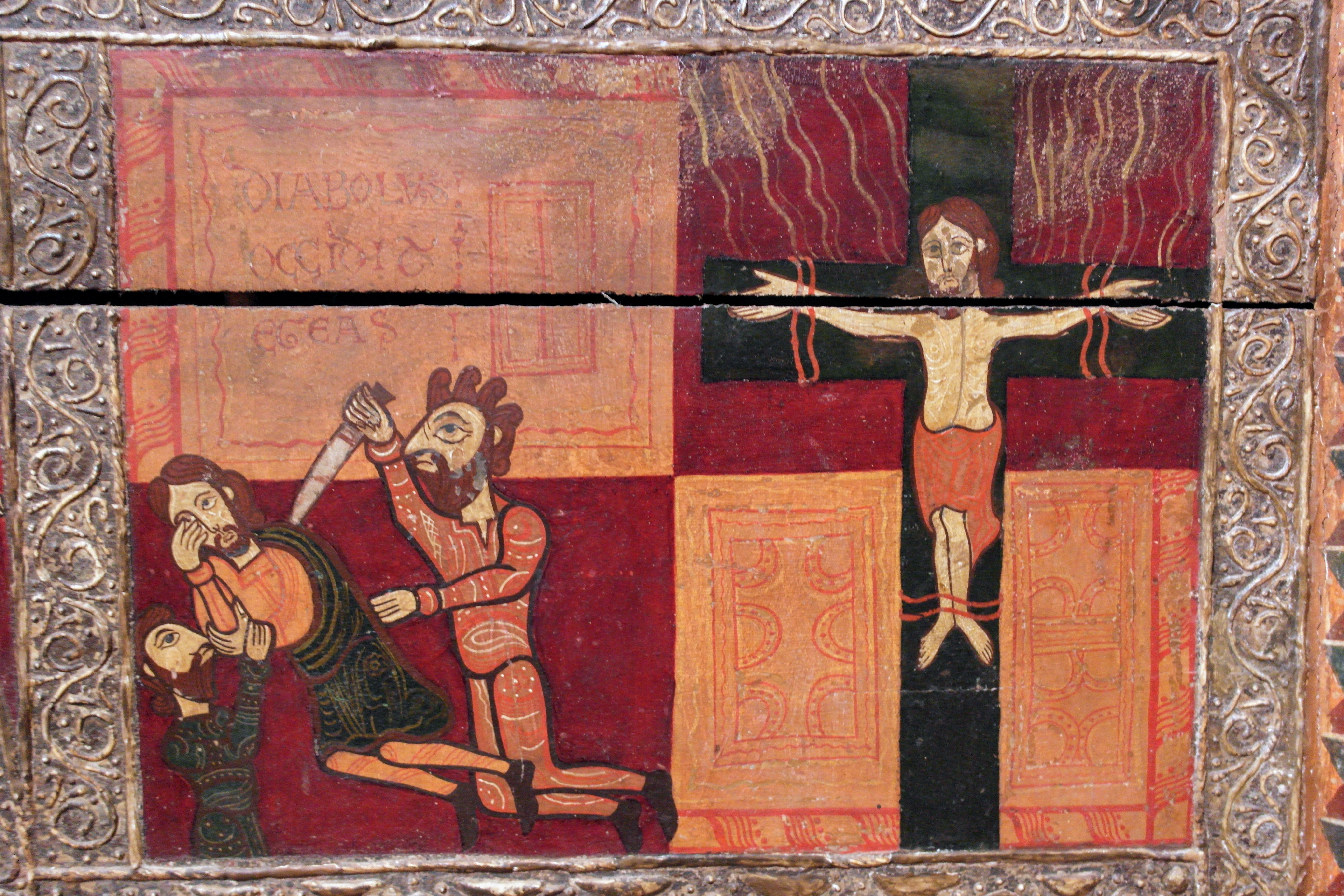 Escena del frontal d'altar de Sant Andreu de Sagàs que mostra la crucifixió de Sant Andreu i la mort del procònsol Egees